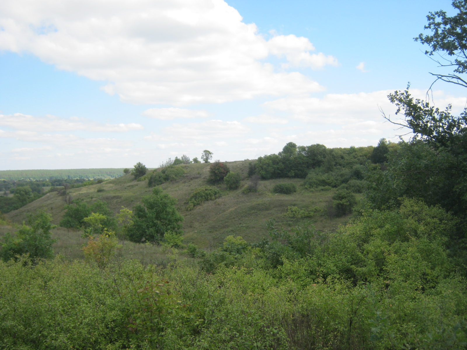 Городище "Мохнач" , Мохнач, на північ від села